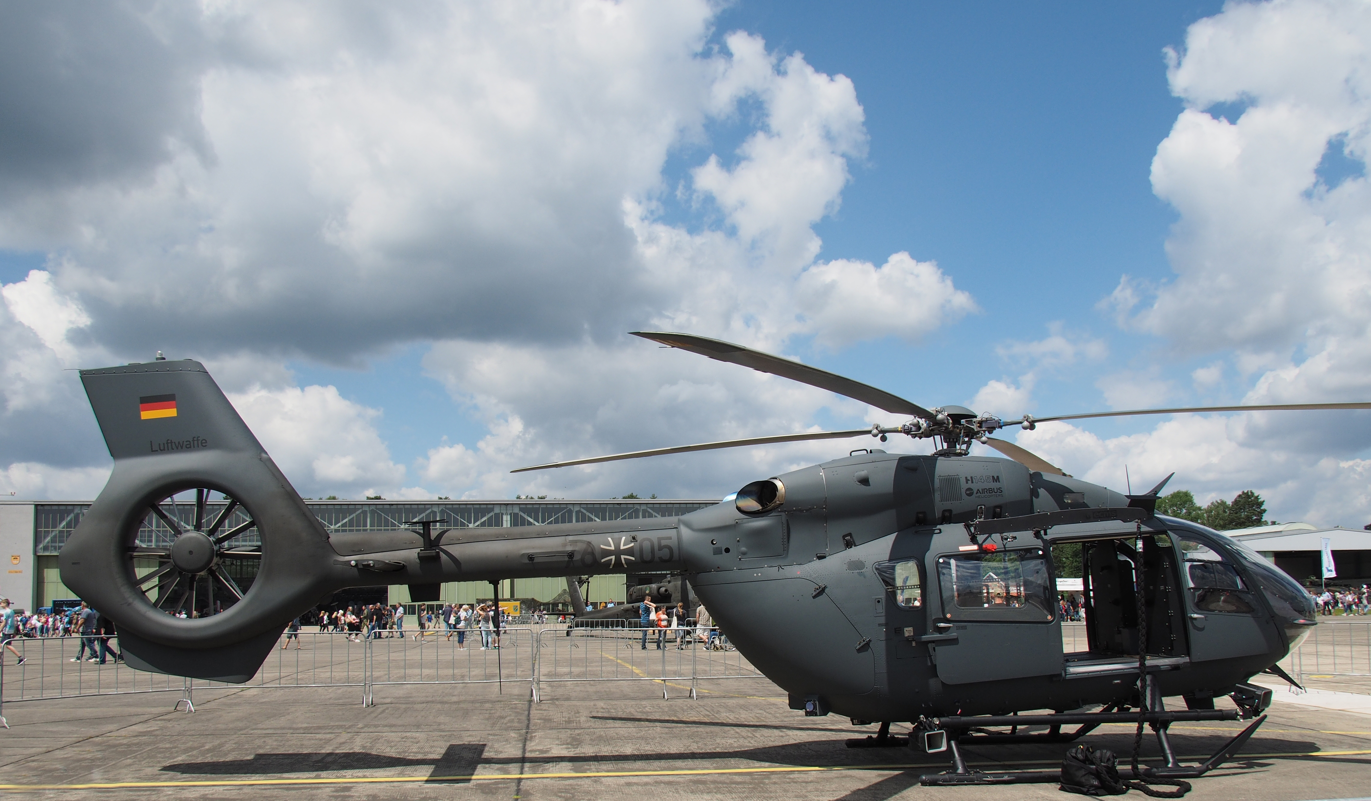 Mehrzweckhubschrauber H145M Gewicht 3.700 kg, Reichweite 663 km Antriebsleistung 2x445kW/605PS Startleistung Hauptrotor 11,00 m Durchmesser